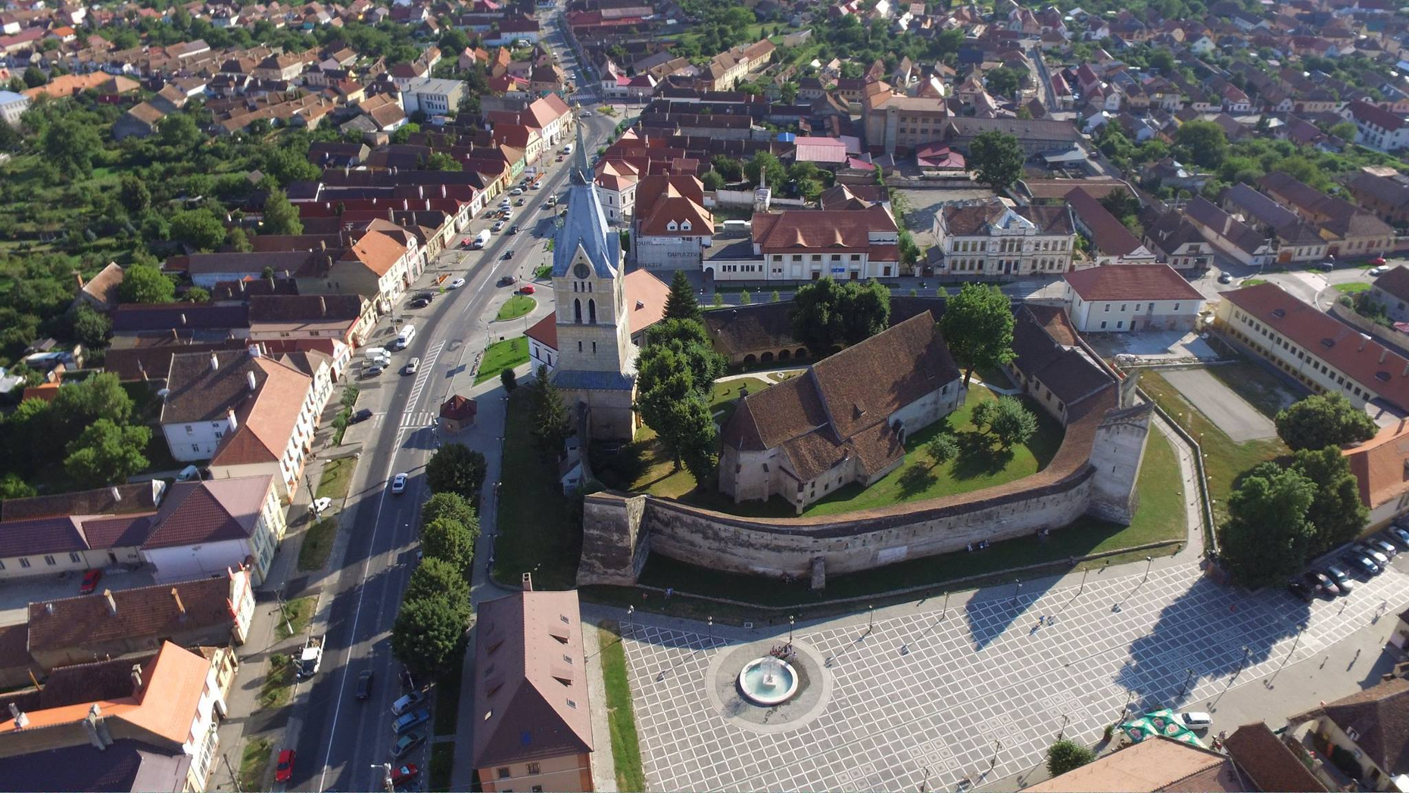 Muzeul Traditiilor si Biserica fortificata din Codlea